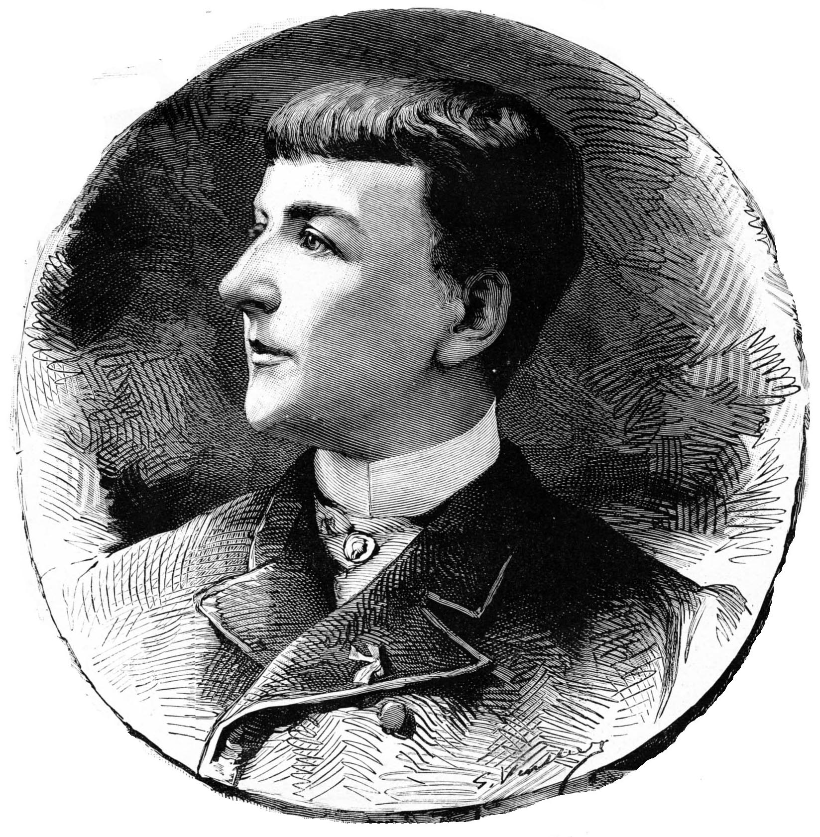 Portrait de Jane Dieulafoy, reproduction d'une gravure (domaine public)